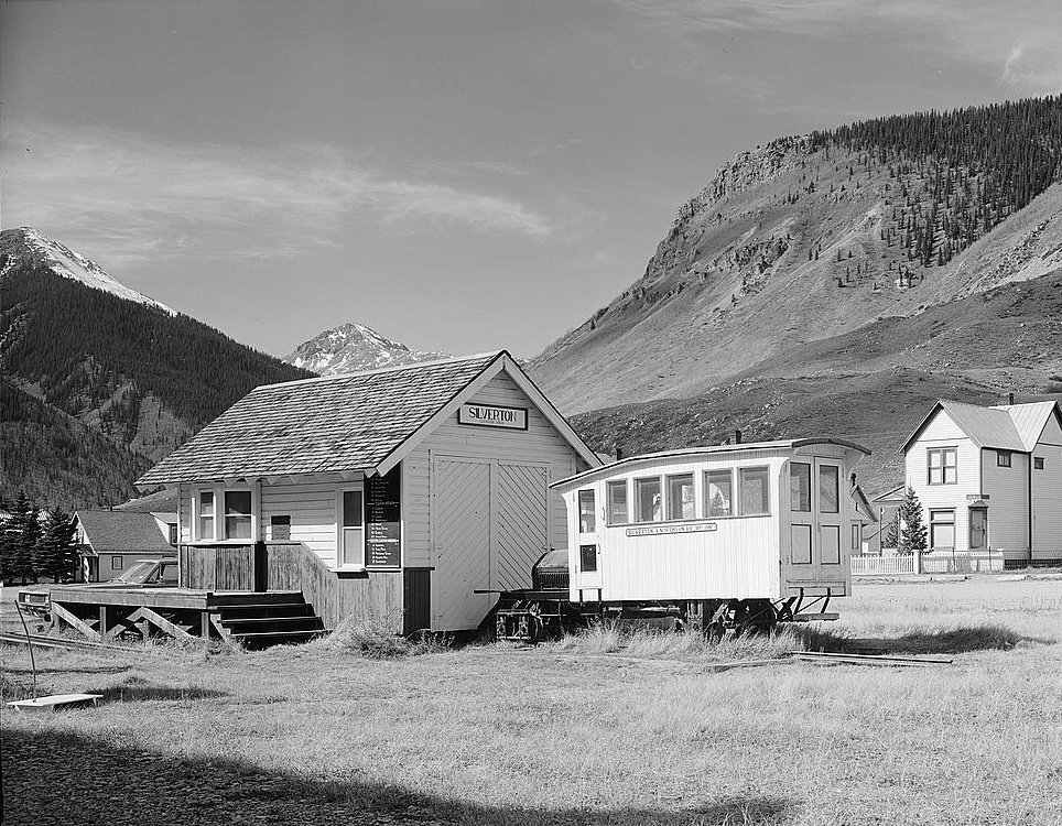 EXTERIOR, GENERAL VIEW WITH RAILROAD CAR HABS COLO,56-SILTN,24-1